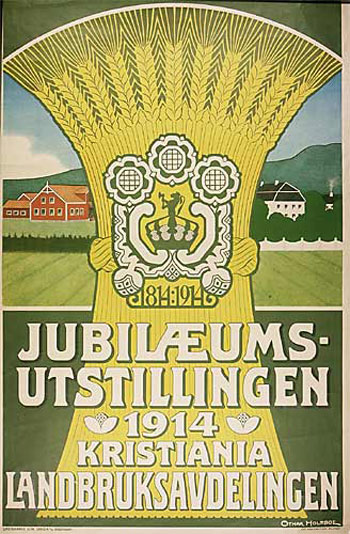 Plakat for landbruksutstillingen ved jubileumsutstillingen 1914, av Othar Holmboe